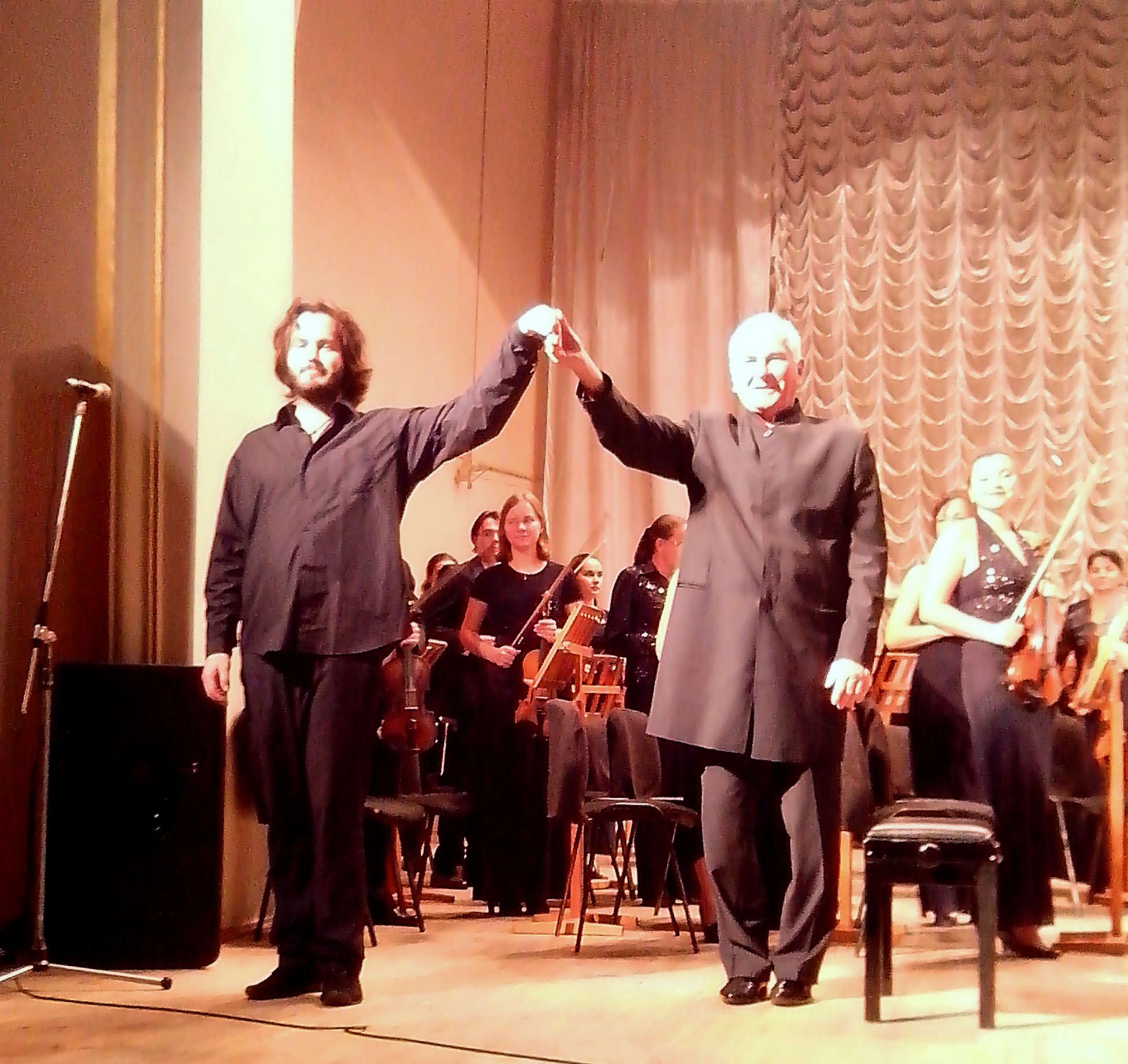 Антоний Барышевский (слева, пианист) и Николай Сукач (справа, дирижёр) на концерте АСО «Филармония» 30 сентября 2016 года.